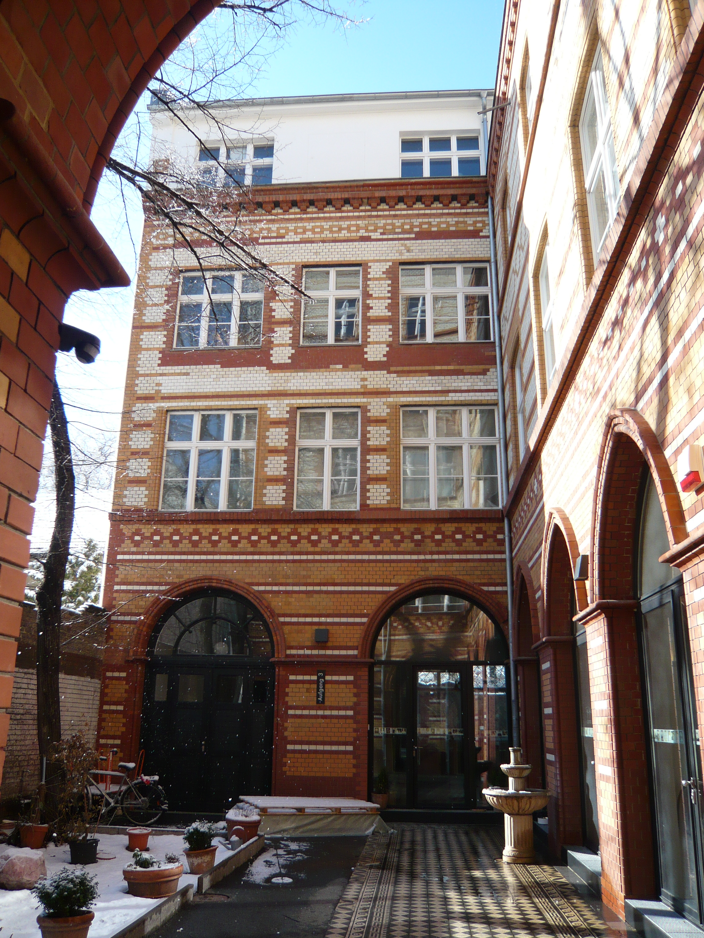 Chausseestrasse 123 in Berlin-Mitte, Hofansicht (5)